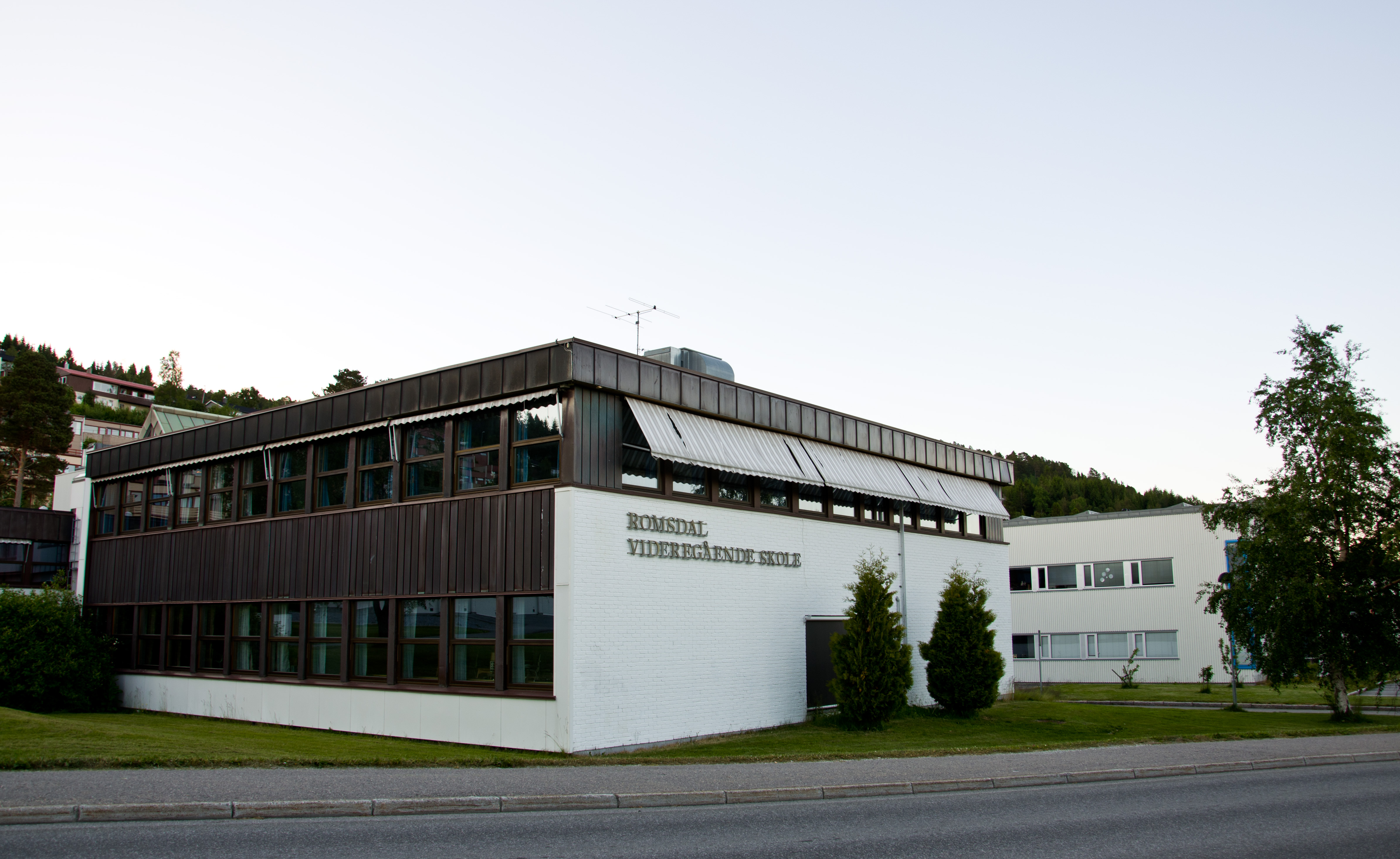 Romsdal videregående i Molde kommune.